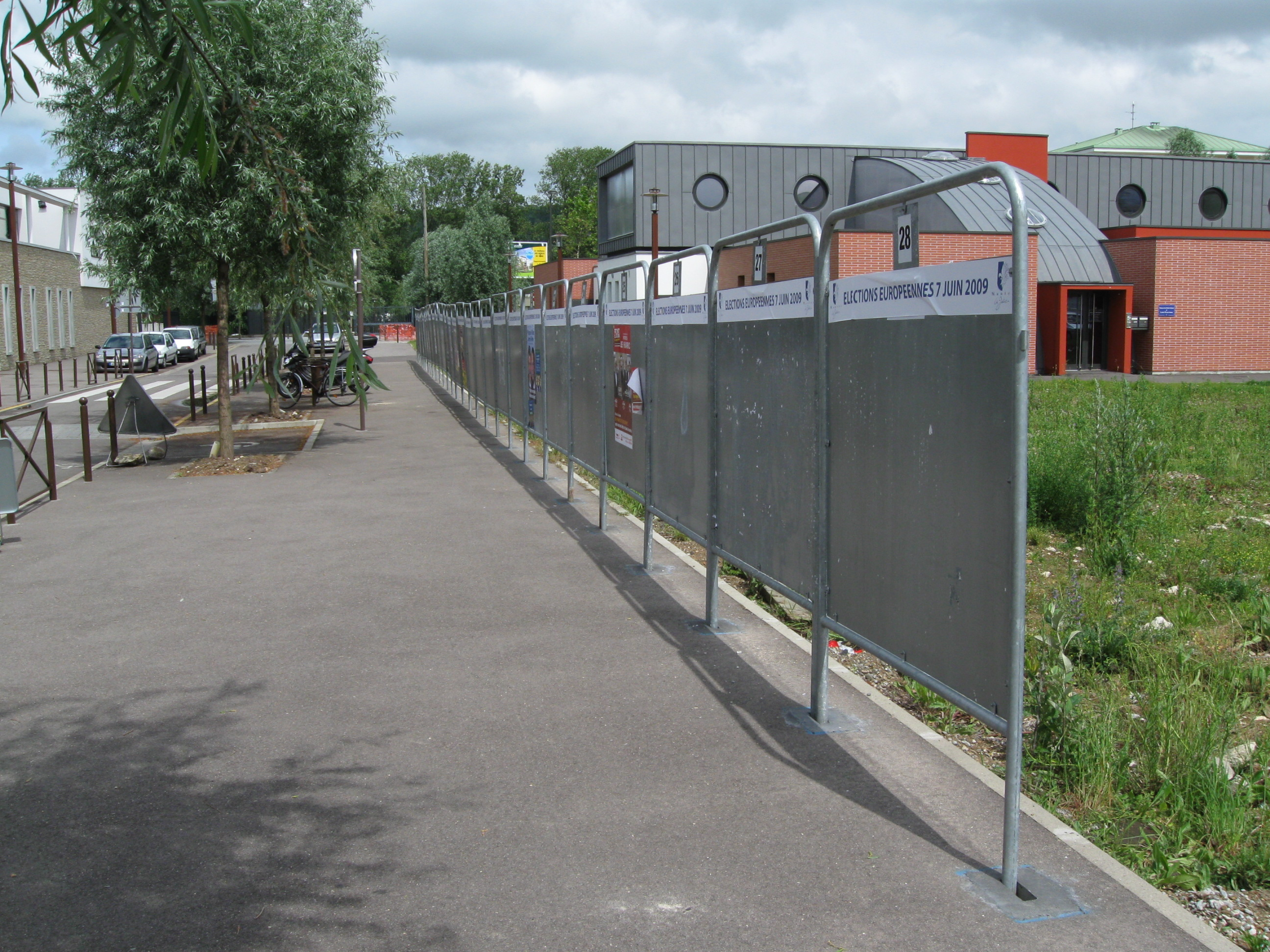 Panneaux électoraux, Mantes-la-Jolie